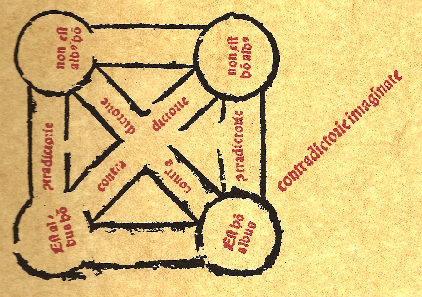 Aristotele, Perihermenias, Venetiis, ed. tip.